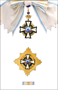 Srpski (latinica): Orden Njegosa prvog reda